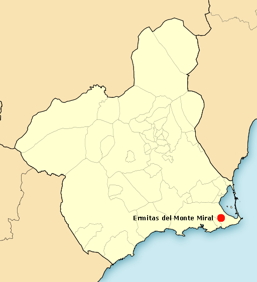 Ermitas del Monte Miral, Monte Miral, Monte Miral , Cartagena, Murcia